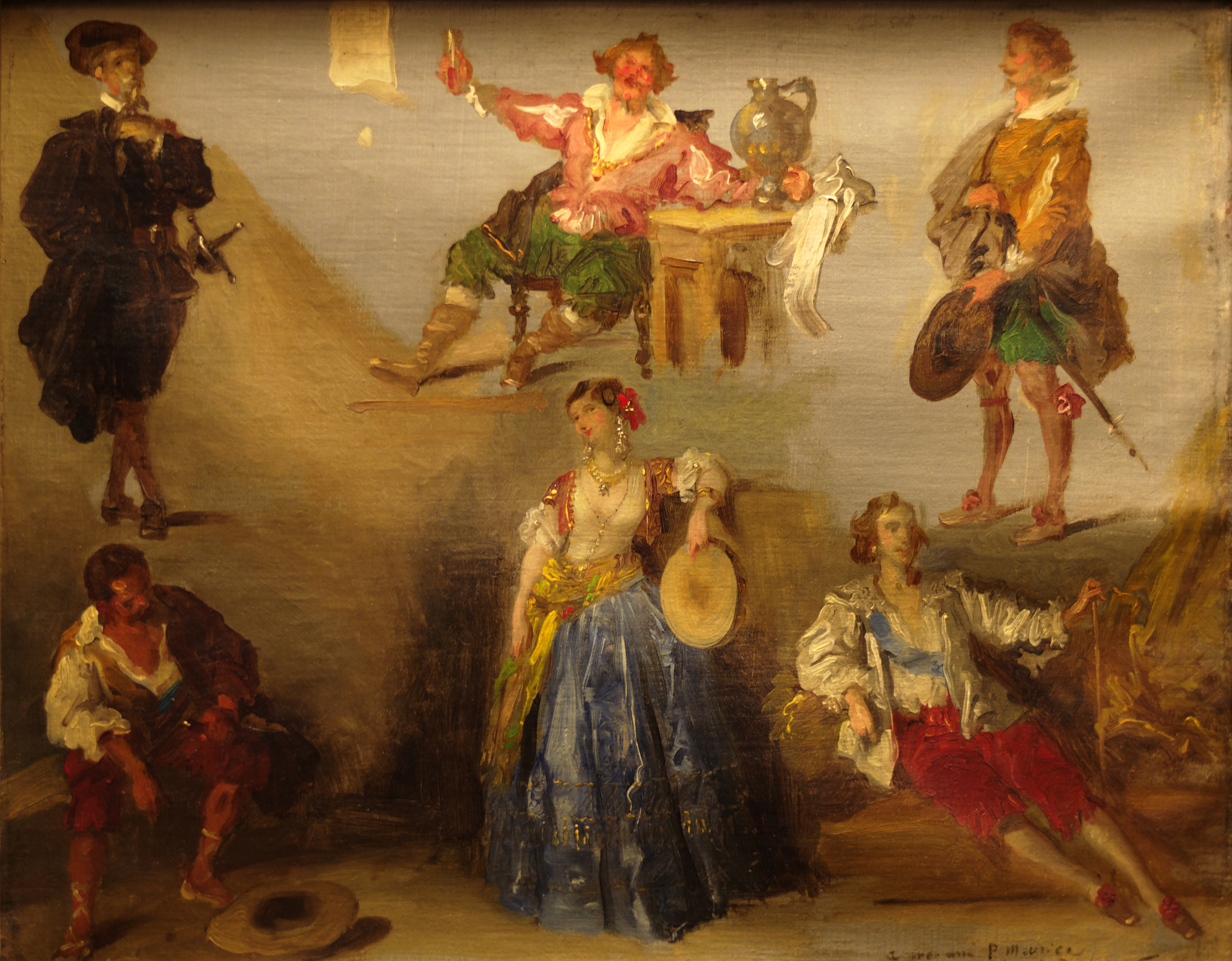 Six personnages de Victor Hugo - Louis Boulanger, 1853. Huile sur toile exposée au musée des beaux-arts de Dijon, acquisition 1980. Inv. 1980-42-P. Sont représentés, de gauche à droite en commençant par le haut : Don Ruy Gomez - Don César de Bazan - Don Salluste - Hernani - Esméralda - De Saverny (Madeleine Blondel, Pierre Georgel, Victor Hugo et les images: Colloque de Dijon, 19-20 octobre 1984, 1989, Ville de Dijon, p. 35)